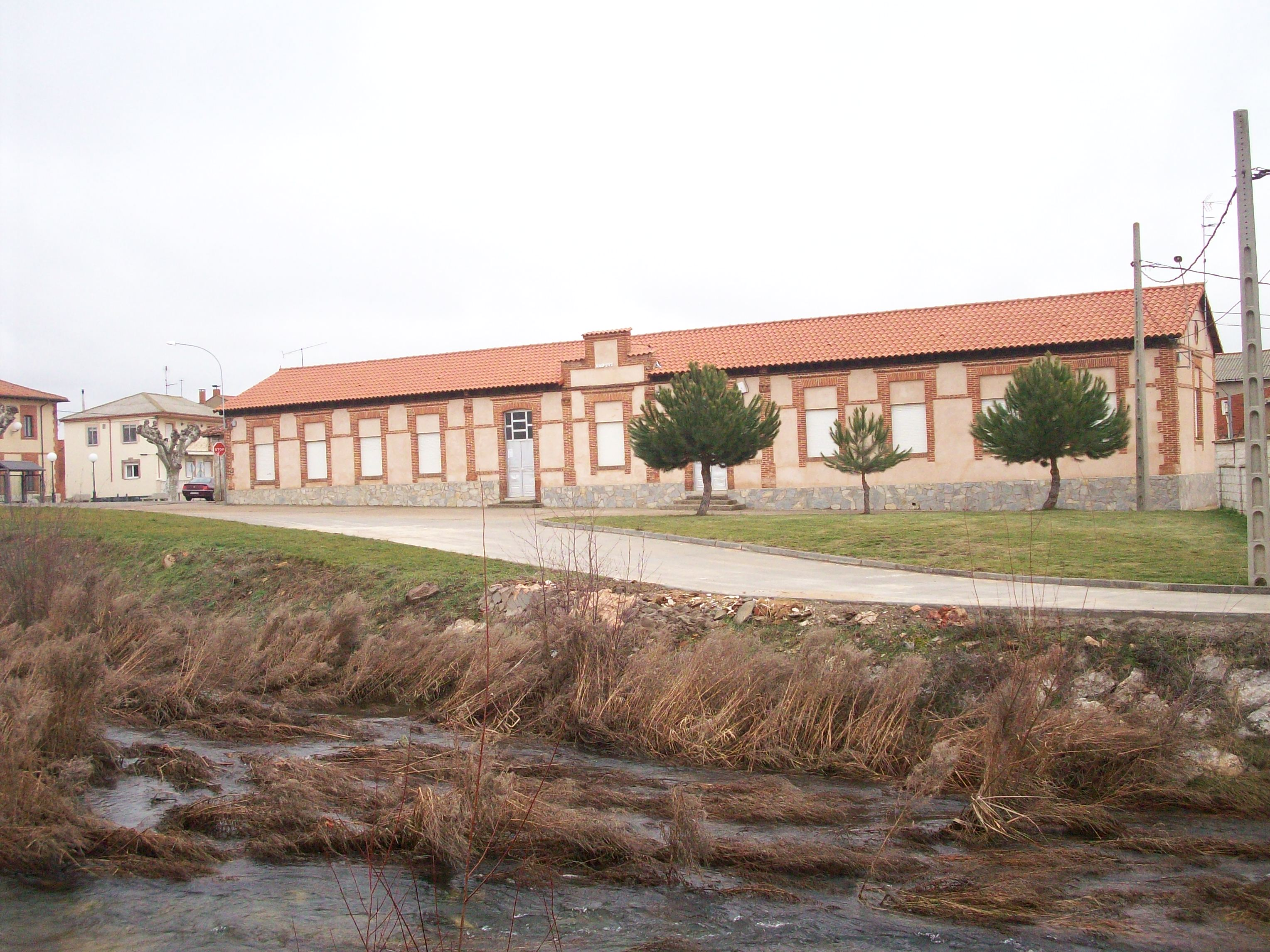 Las escuelas nacionales de Turcia, construidas en 1917.